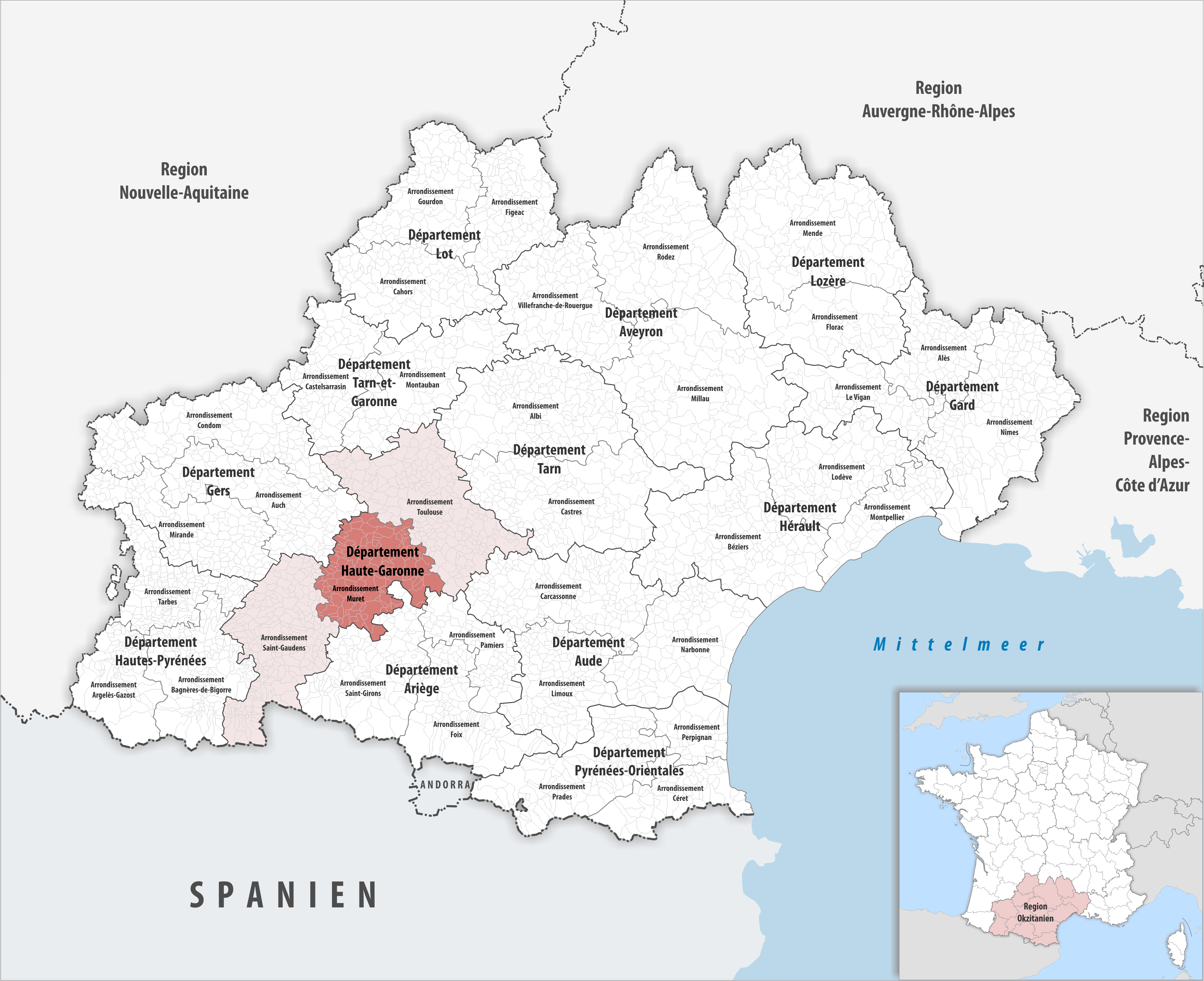 Lage des Arrondissements Muret